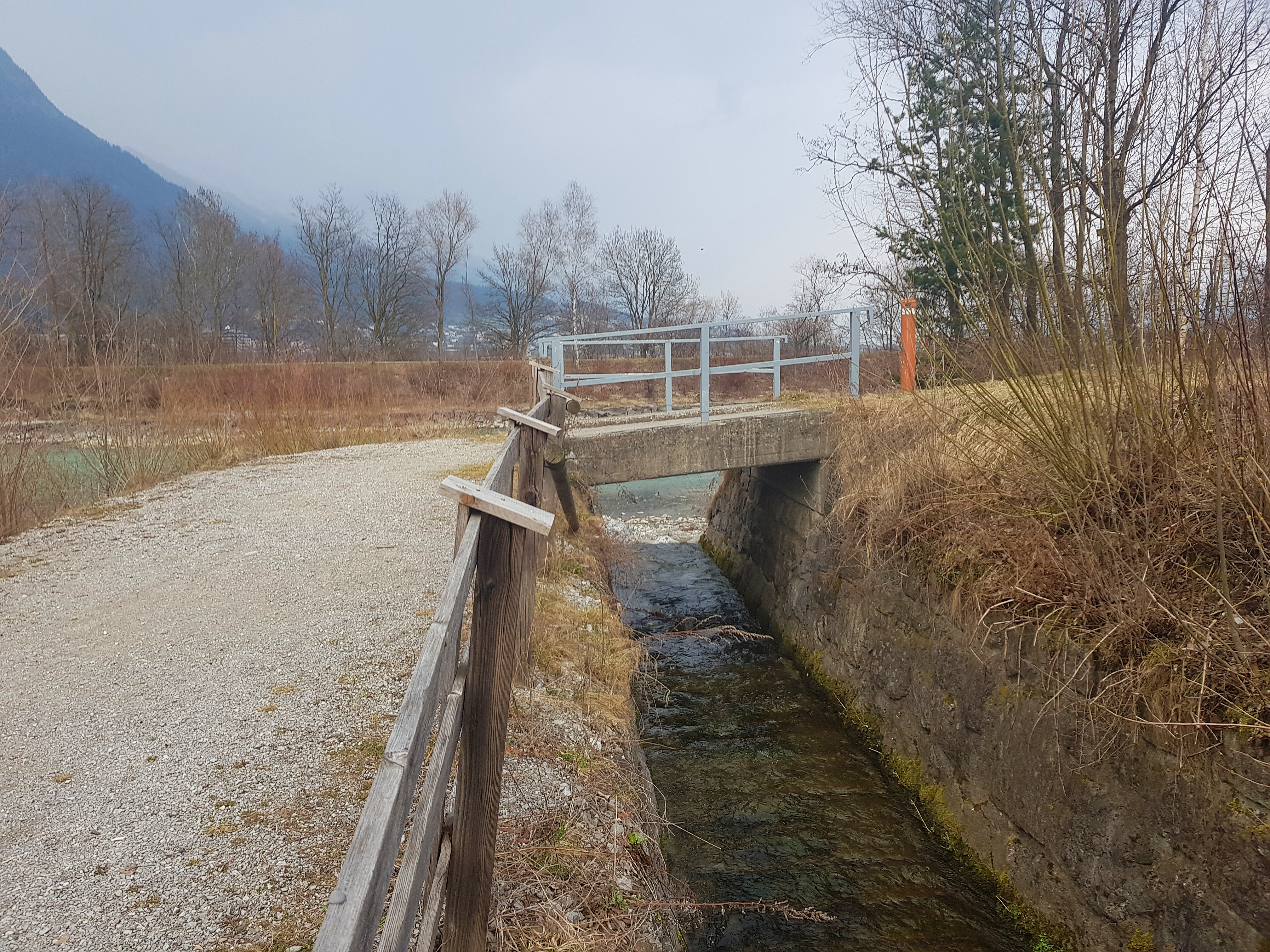 Mündung des Axamer Bachs in den Inn